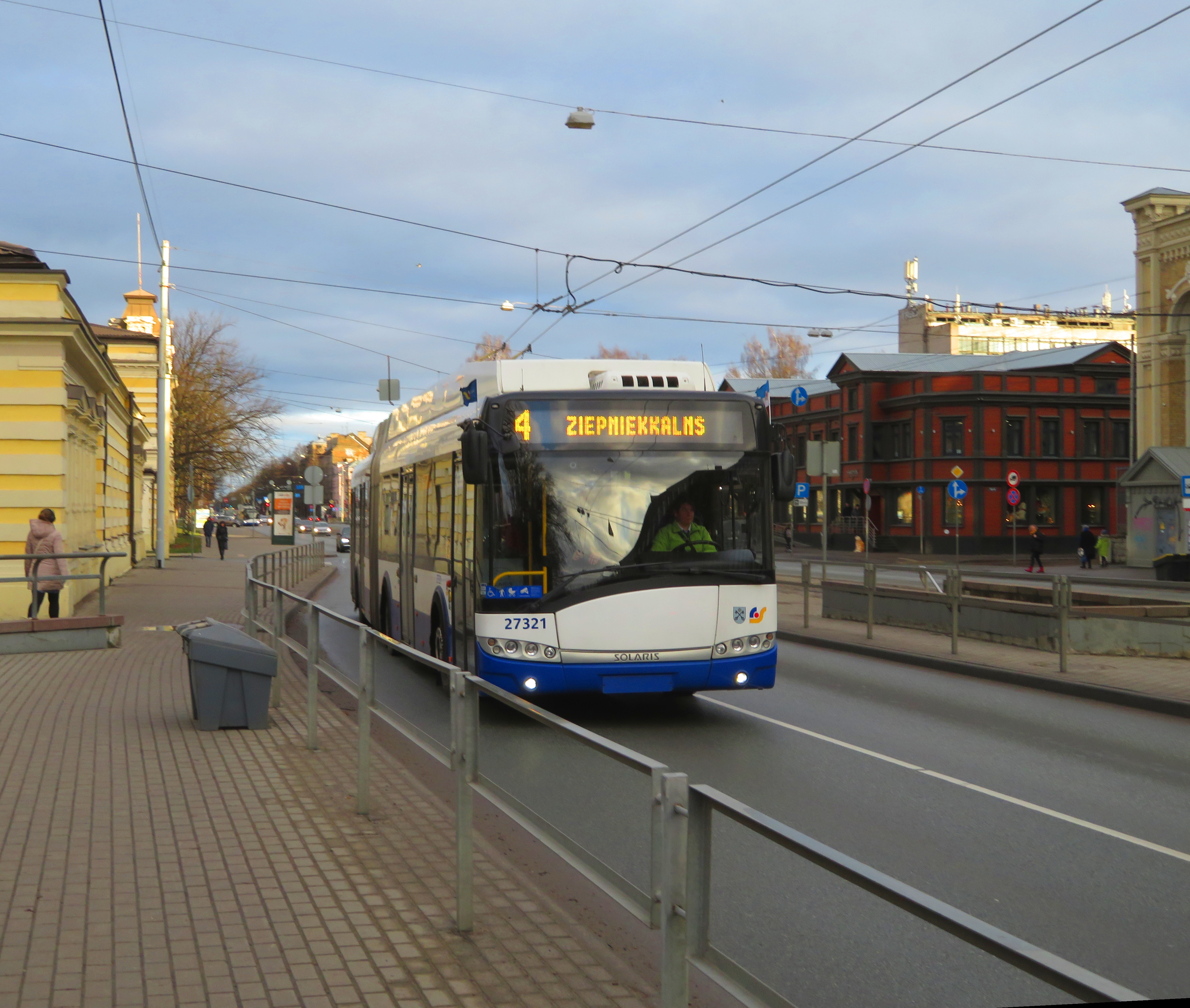 4. trolejbuss Brīvības ielā